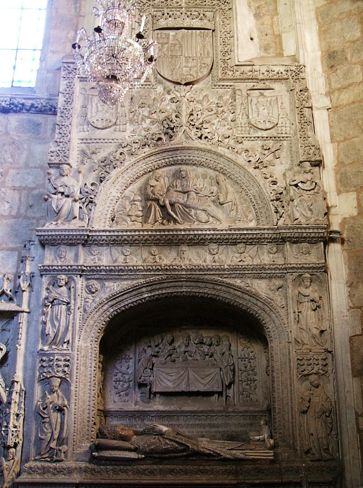 Sepulcro plateresco (principios siglo XVI) de don Juan de Ortega, obispo de Almería, en la la iglesia del Convento de Santa Dorotea, MM Canónigas Agustinas, Burgos, España